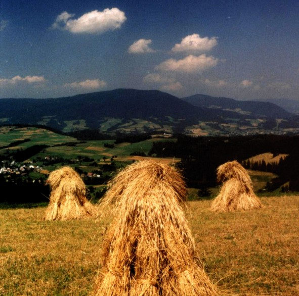 Widok na Gorce